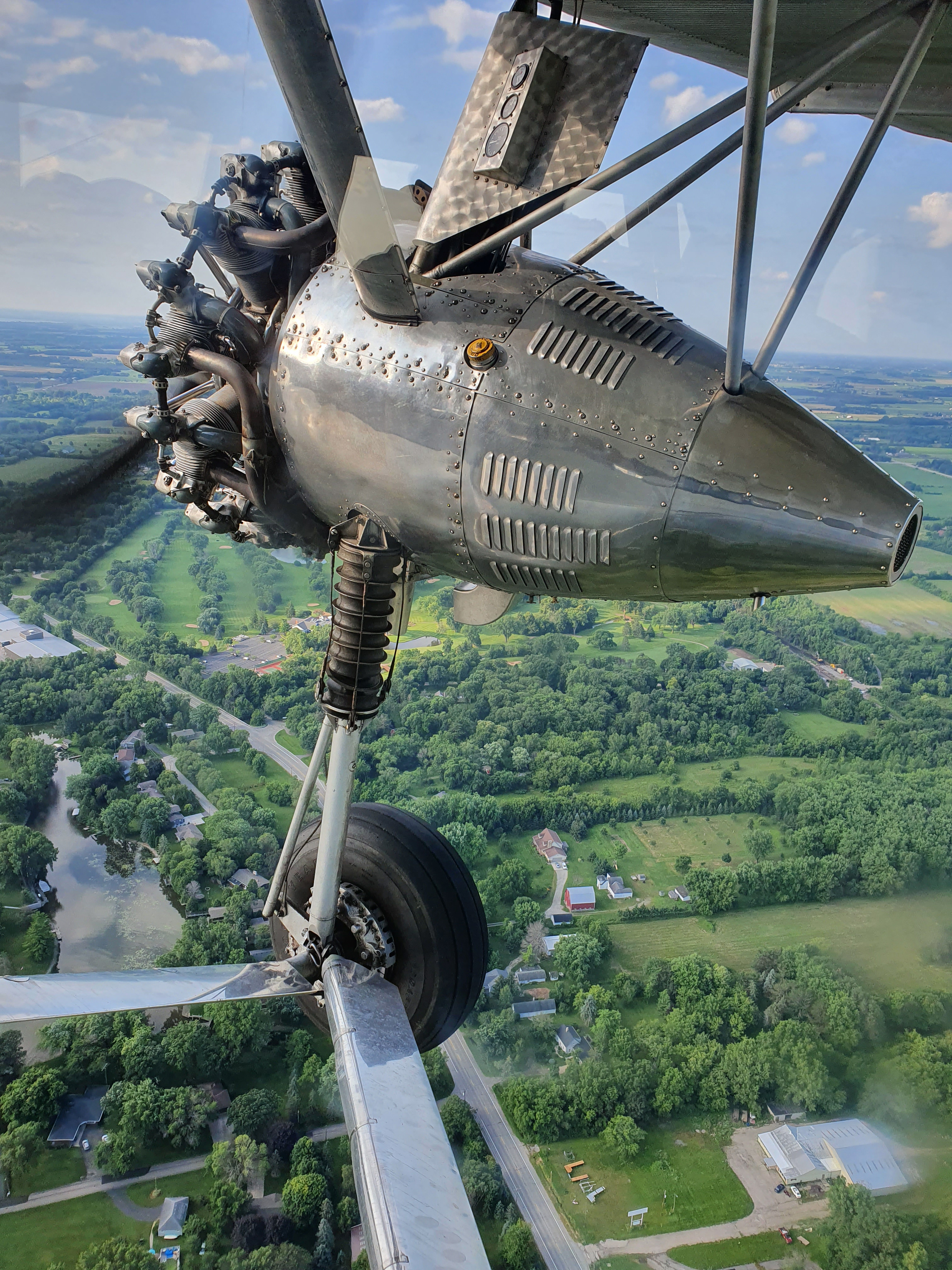 F T D 2